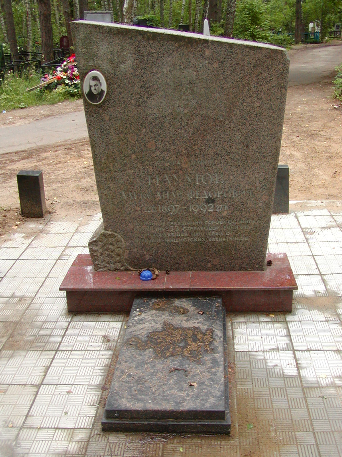 Надгробный памятник Александру Фёдоровичу Наумову на Кончаловском кладбище в Обнинске